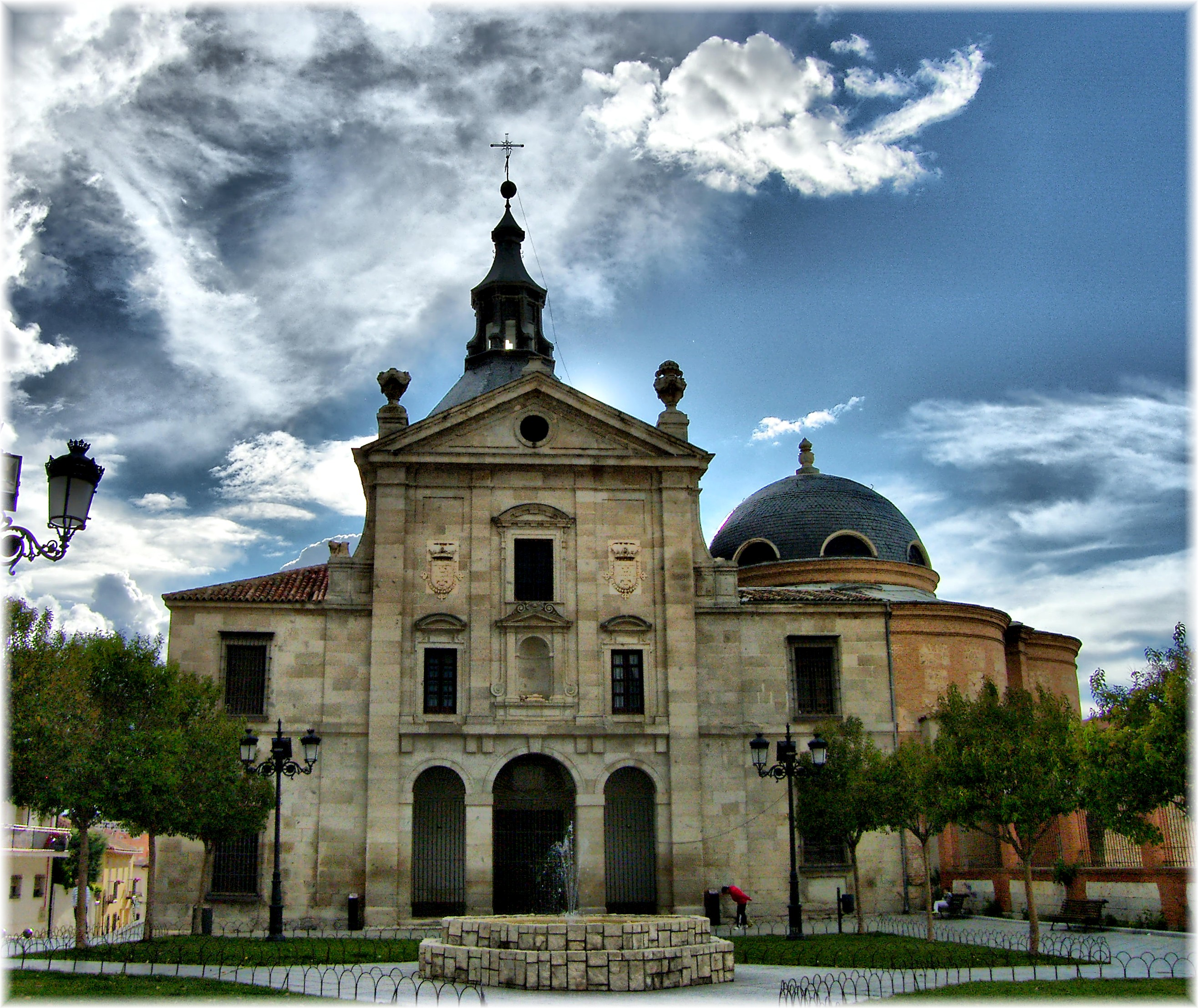 Loeches es una población de Madrid en España. Según el INE, el 1 de enero de 2009 contaba con 6.781 habitantes. Pertenece al partido judicial de Arganda del Rey. Se encuentra al Este de la provincia, entre Alcalá de Henares y Arganda del Rey, en la subcomarca natural de la Alcarria de Alcalá. Existen datos de ella desde el siglo XII, y su nombre es, según Madoz, de origen vasco, debido a los efectos de la repoblación con pastores vascones durante la reconquista. Recibió el título de villa en 1555, por parte del Emperador Carlos I de España y V de Alemania. Felipe II la vendió, junto a otras villas pertenecientes al Arzobispado de Toledo, para sufragar los gastos del Estado con bula del Papa, y el comprador fue el Genovés Baltasar Catanno. Este a su vez vendió el señorío a la familia Cárdenas-Avellaneda. La familia Cárdenas fundó allí el Convento de carmelitas de San Ignacio Mártir en 1596, y allí permanecen inhumados El Conde-duque de Olivares compró el señorío en 1633. Pretendió hacerse con el patronazgo del monasterio de carmelitas pero no lo consiguió. Por ello encargó a Alonso Carbonel (arquitecto del Buen Retiro), la obra de un nuevo monasterio, el Monasterio de la Inmaculada Concepción, frente al anterior, muy similar al Real de la Encarnación de Madrid. En 1643 el Conde-duque de Olivares cesó como primer ministro de Felipe IV y fue desterrado a Loeches, proyectando convertir sus montes en un gran coto de caza, pero la oposición de los agricultores se lo impidieron. En 1645, el Conde-duque dejó Loeches al ser desterrado a Toro (Zamora) pues sus enemigos querían alejarlo aún más de la corte. Ese verano murió y fue llevado nuevamente al monasterio de Loeches donde permanece enterrado hoy día. Wikipedia